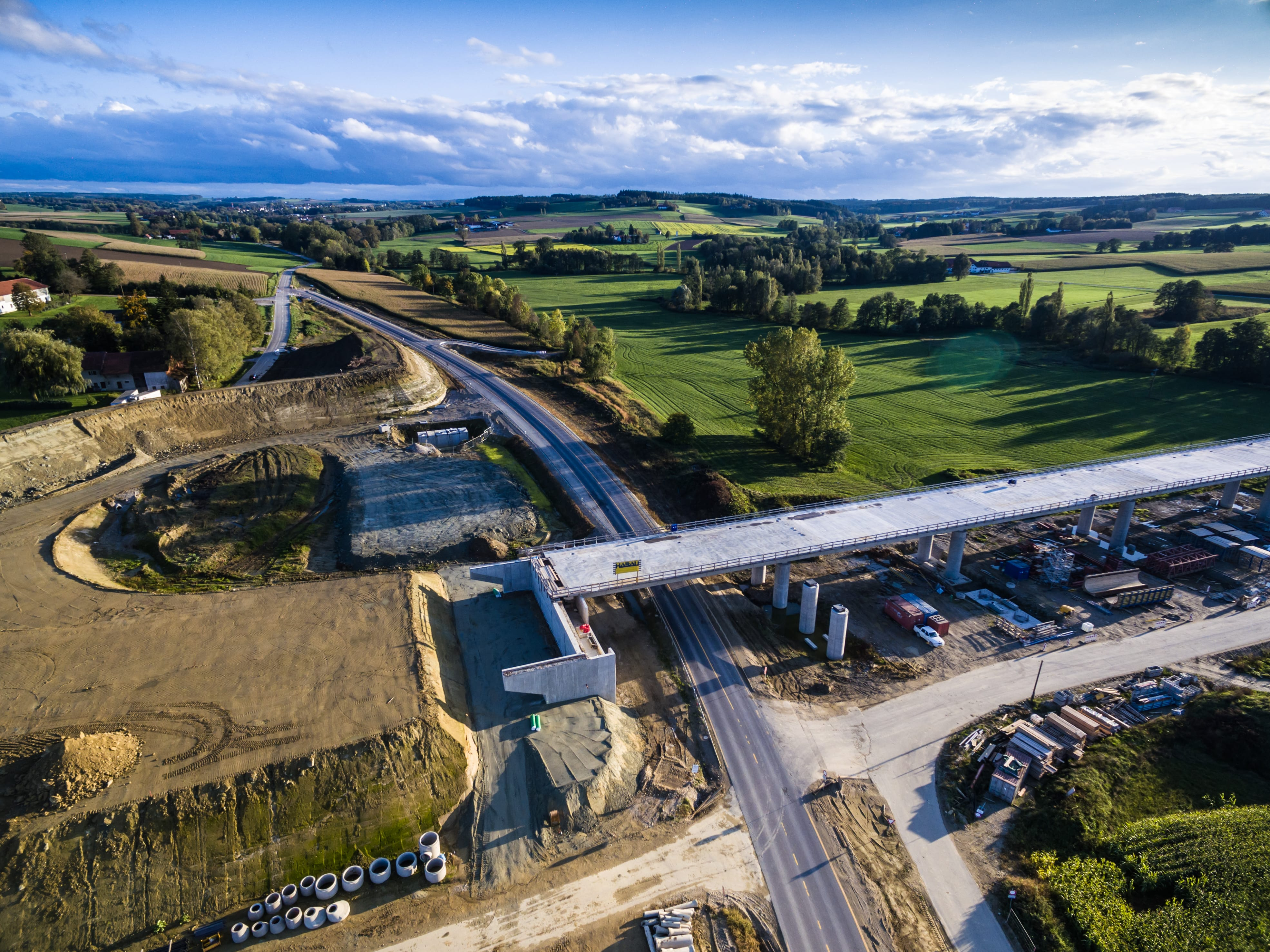 Isentalbrücke der A94 und Anschlussstelle Lengdorf im Bau.